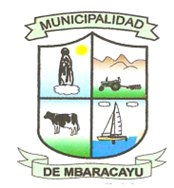 Logotipo Municipalidad de Mbaracayú